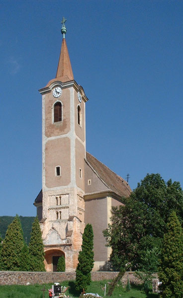 Kővágószöllős, Sarlós Boldogasszony plébánia templom